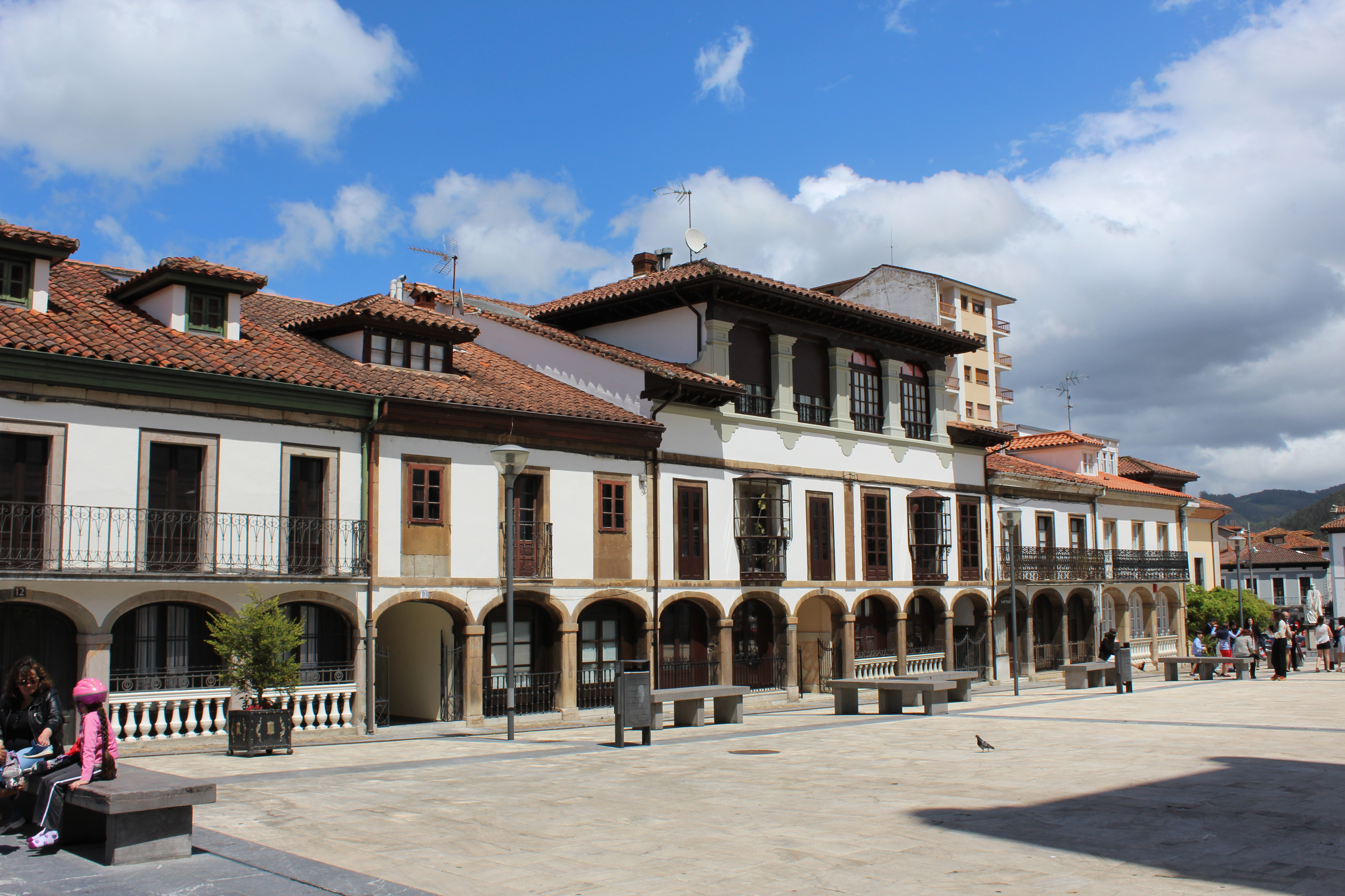 Conjunto Histórico de la Villa de Pravia. Plaza y casas típicas.